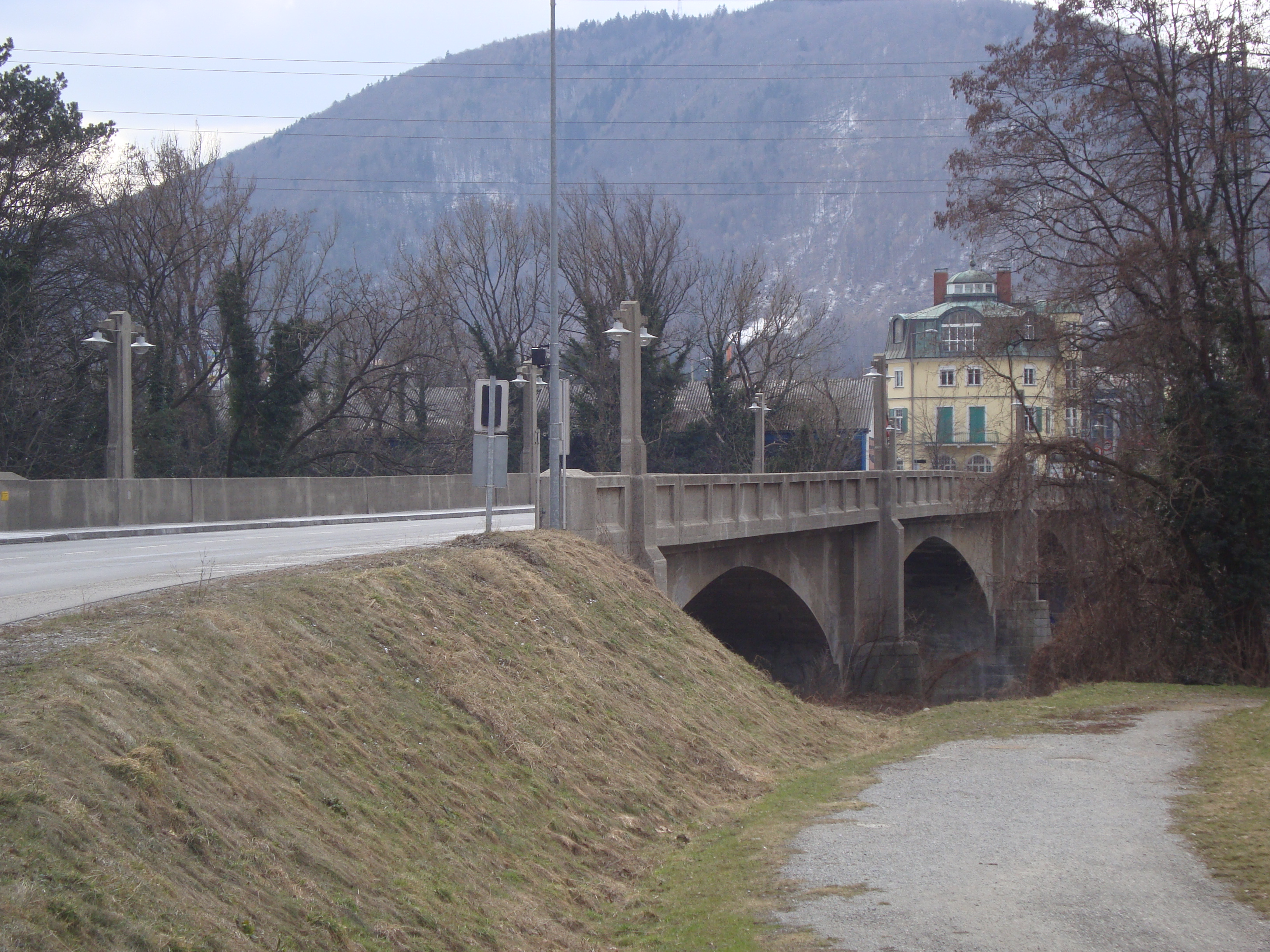 Weinzöttlbrücke, Graz zwischen Andritz und Gösting